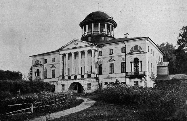 Pokrovskoye Palace near Przhevalskoe (built 1786, destroyed 1923)